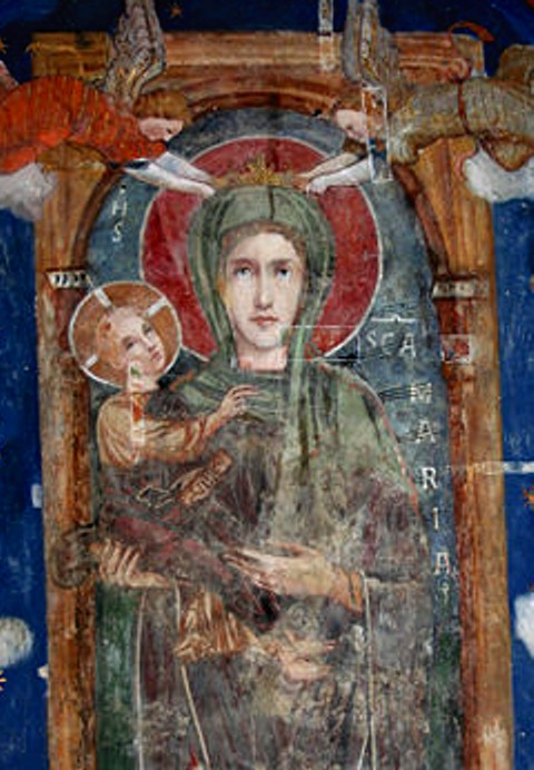 Particolare dell'affresco della Madonna del castello ritenuto miracoloso.